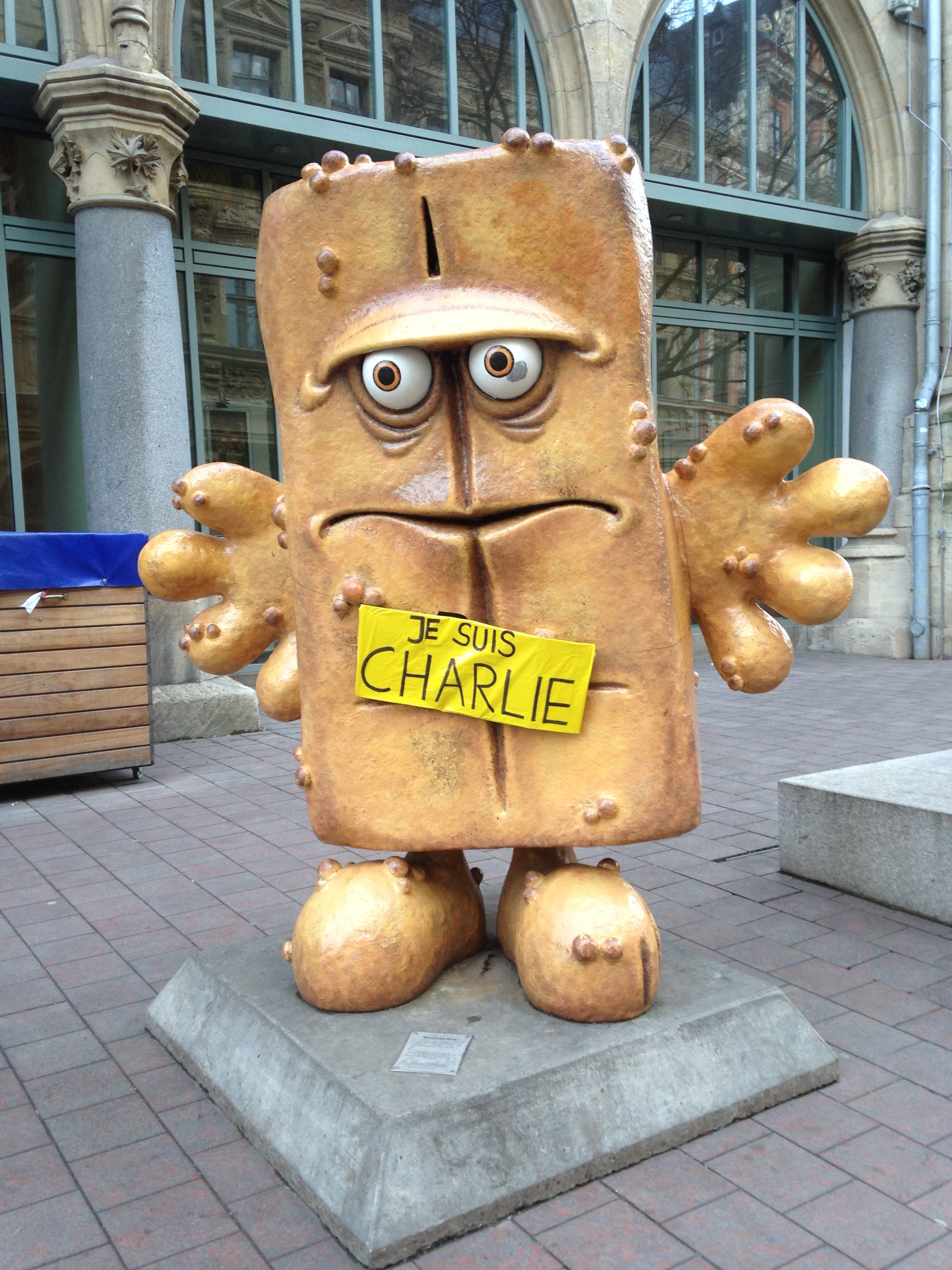 "Berd das Brot" - je suis Charlie - Erfurt - 01.Januar 2015